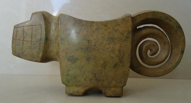 Mortero, Valdivia Costa Sur // 4000 a.C. - 1500 a.C.